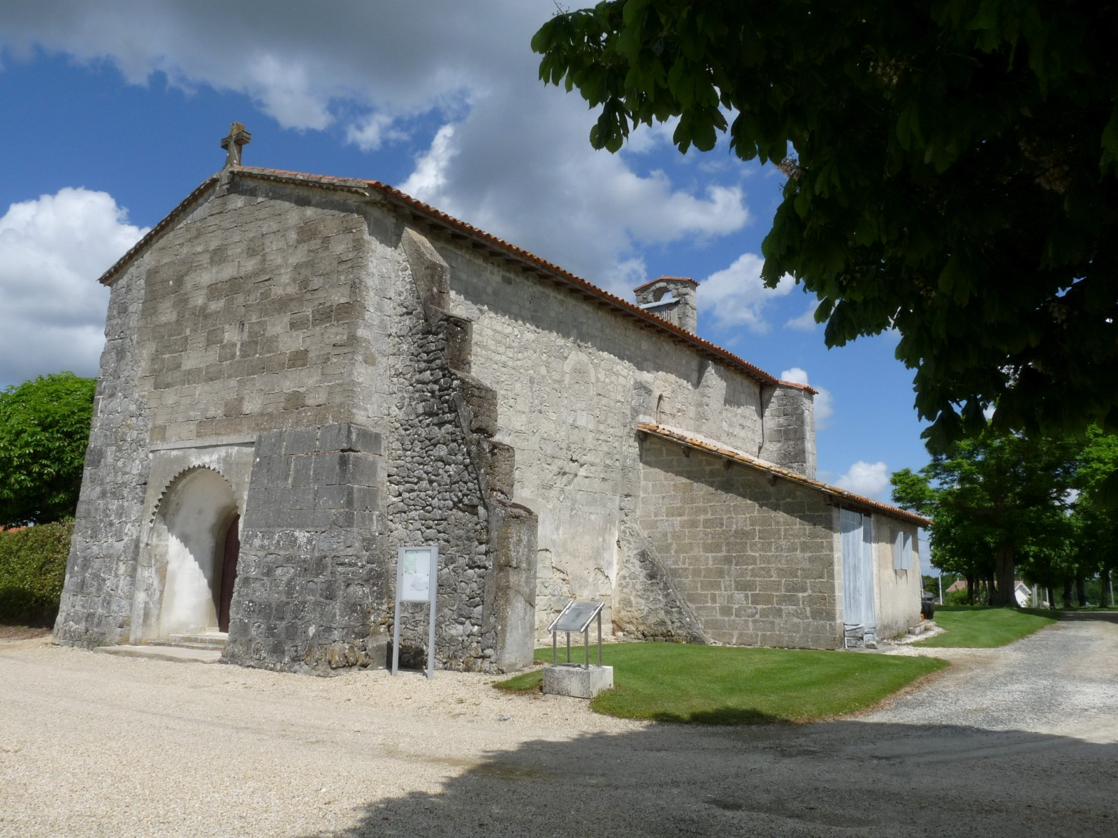 Boscamnant, Charente-Maritime, France